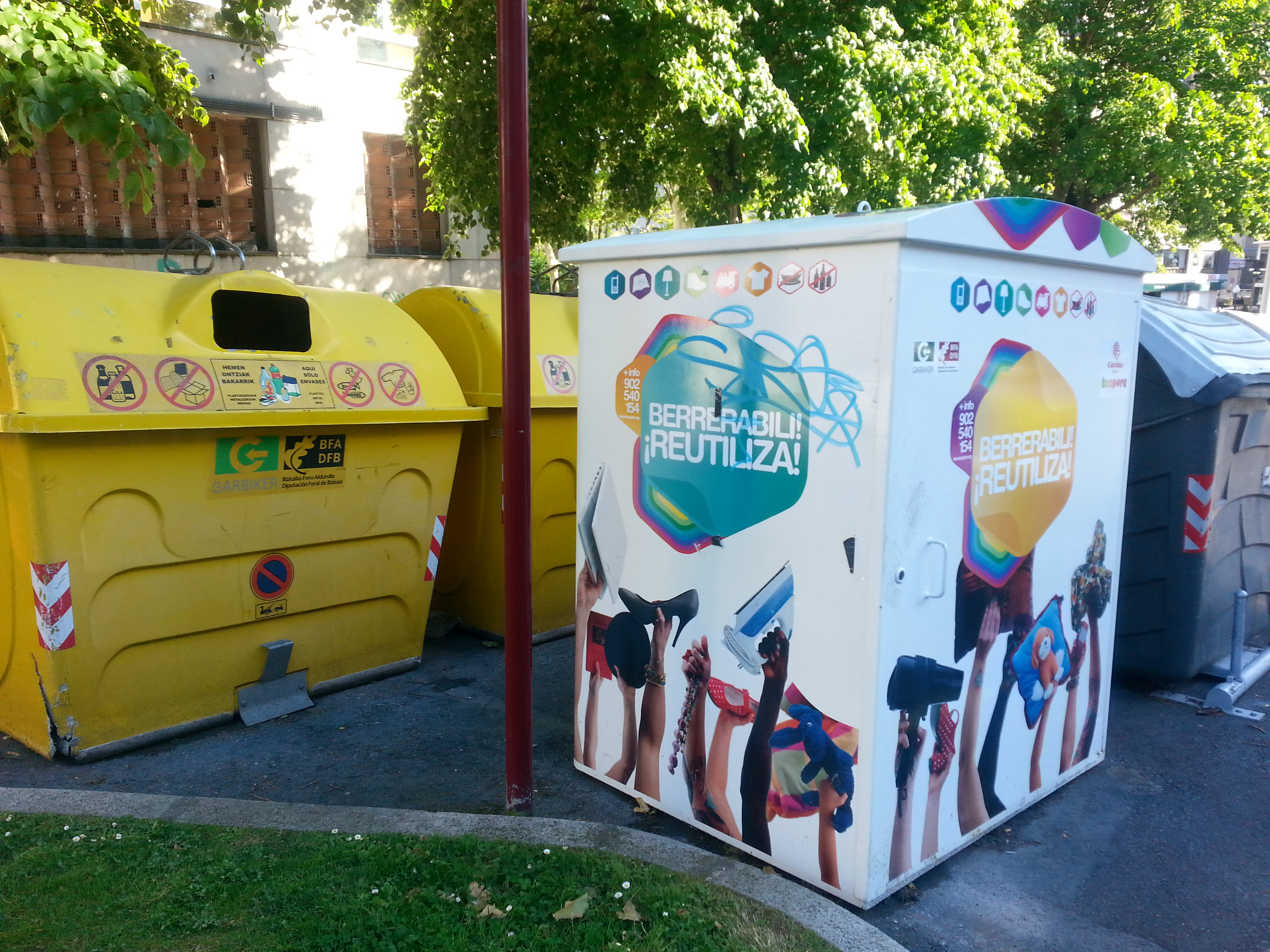 Arropa berrerabiltzeko edukiontzi zuria.